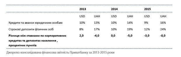 Різниця між ставками по кредитам та депозитам у консолідованій звітності "ПриватБанку" 2013-2015